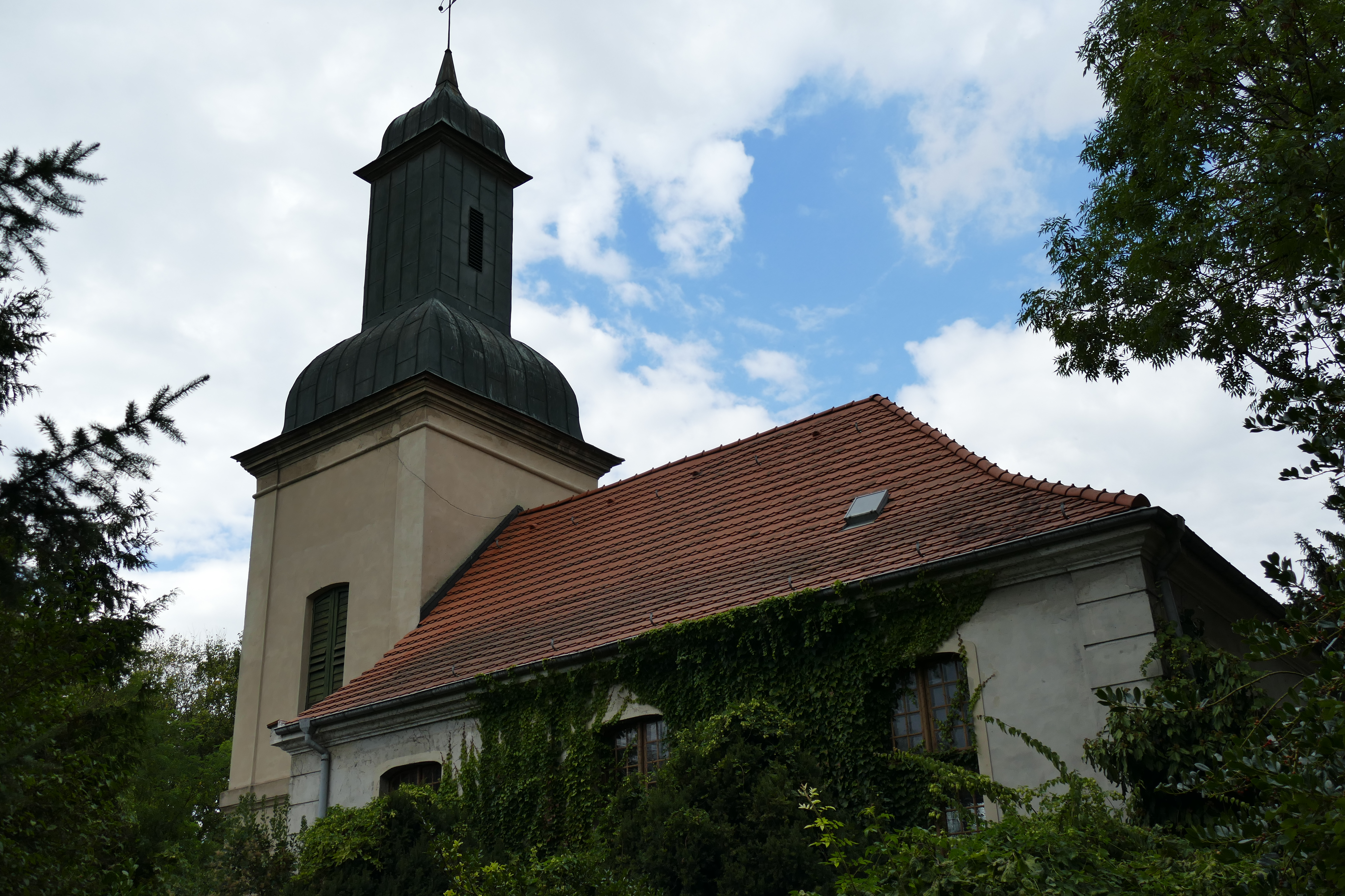 Bild der Kirche Grube